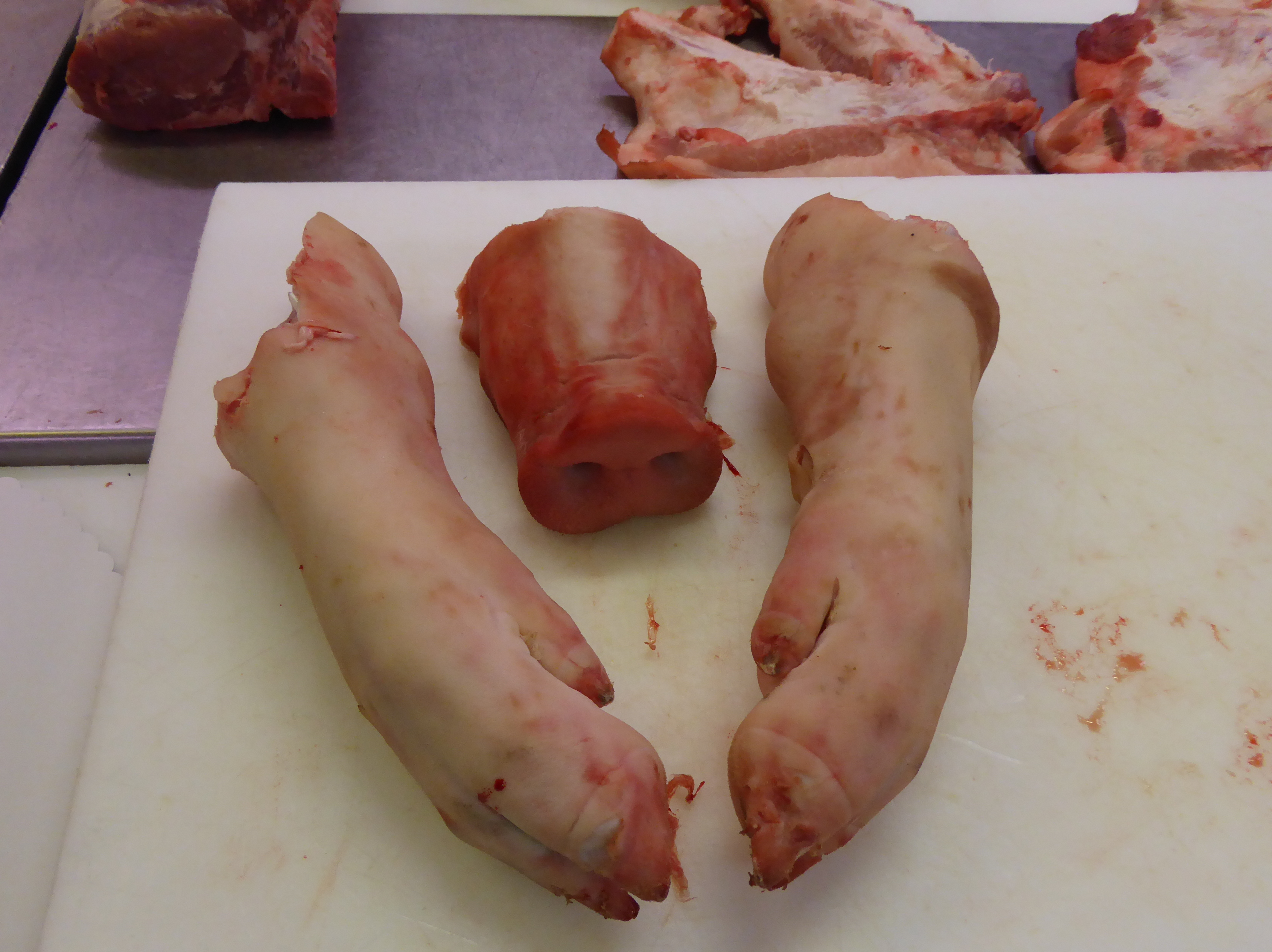 Wiki Loves Mett: Schnauze und Vorderpfoten